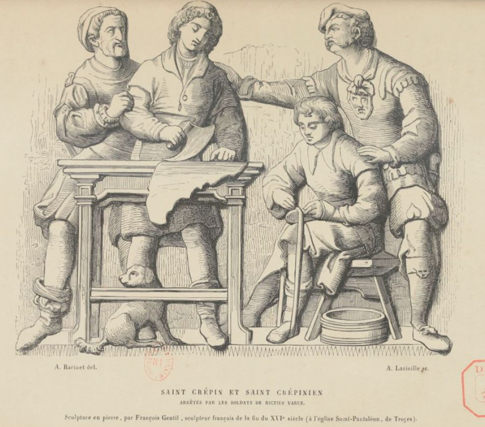 Dessin extrait de : Lacroix, Paul (1806-1884) et Alphonse Duchesne. Histoire de la chaussure, depuis l'antiquité la plus reculée jusqu'à nos jours, suivie de l'histoire sérieuse et drôlatique des cordonniers et des artisans dont la profession se rattache à la cordonnerie, 1852. Contenant 250 gravures sur bois de Ferdinand Seré (1818-1855) BNF Gallica